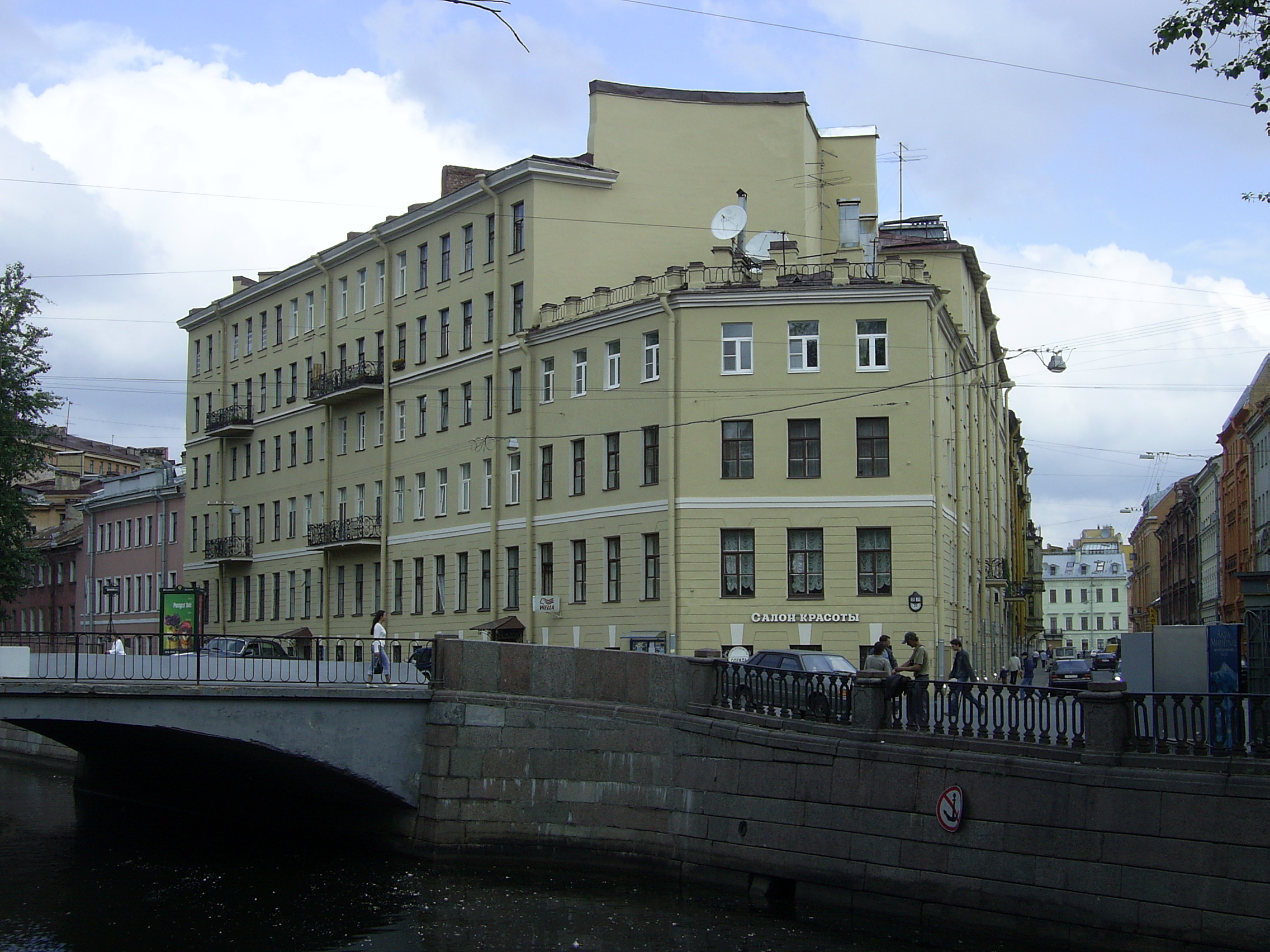 Дом 104 по набережной канала Грибоедова (Санкт-Петербург), в котором жила старуха-проценщица из романа «Преступление и наказание» Фёдора Михайловича Достоевского. Справа видна часть Харламова моста.